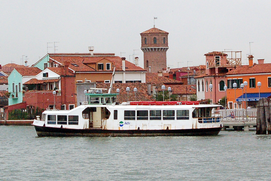 ACTV Boat - Burano Island